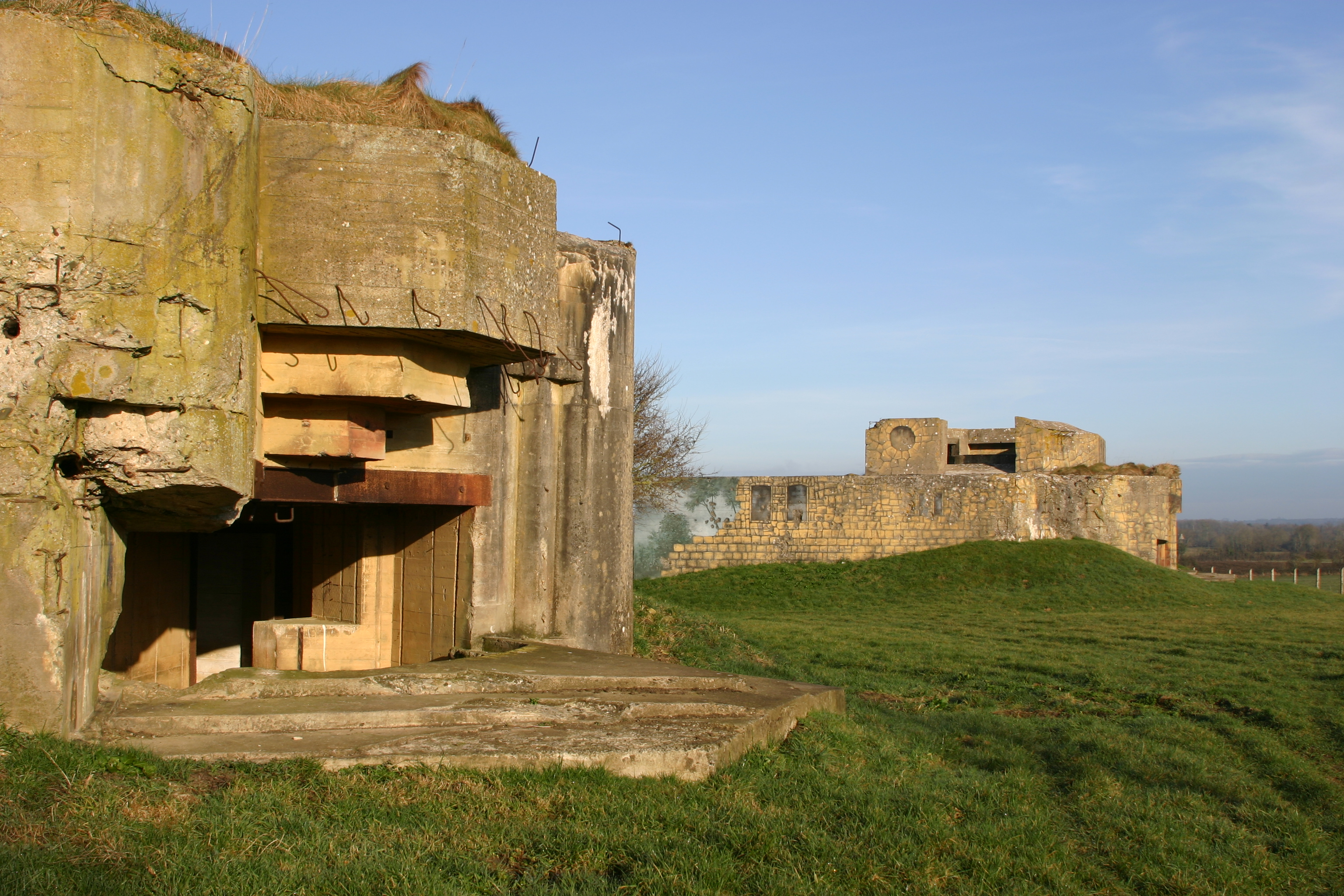 Casemates nord